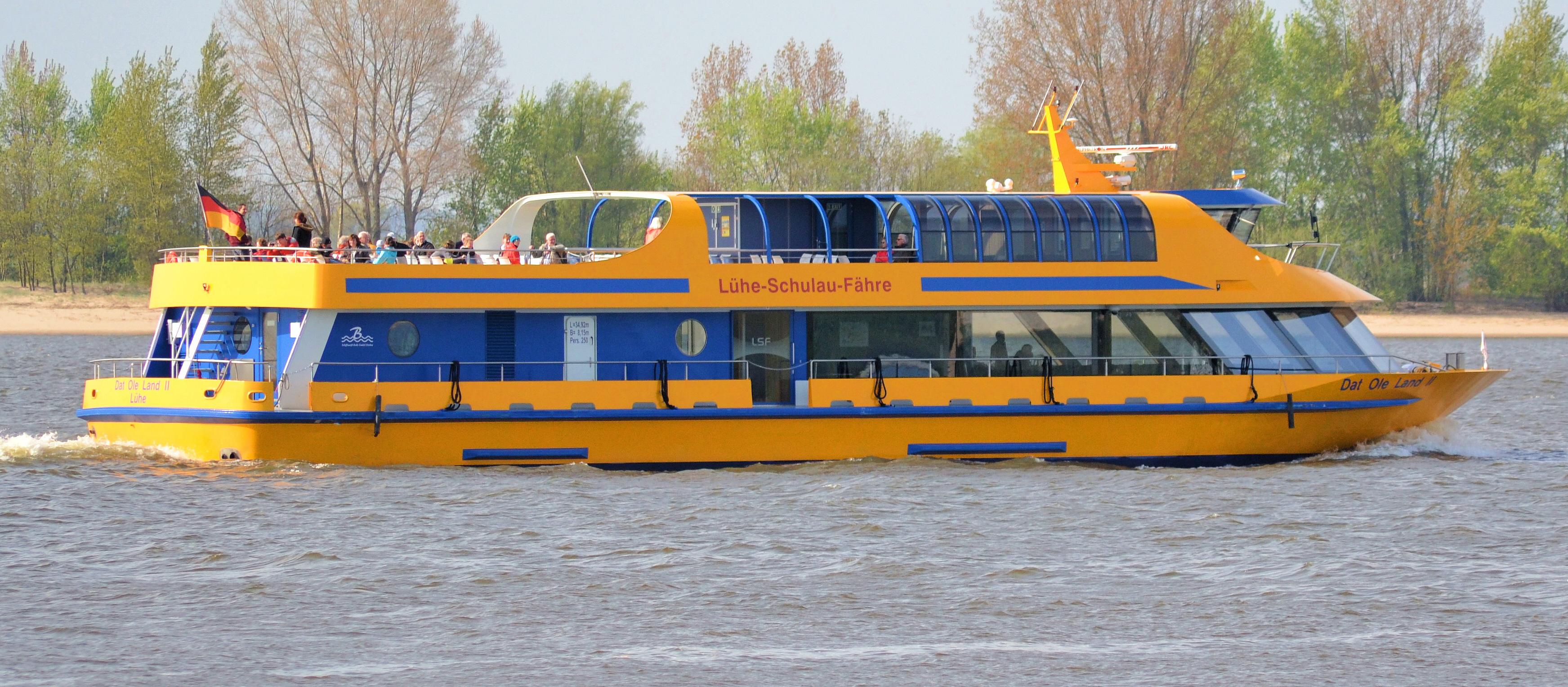 Das Fahrgastschiff Dat ole Land II auf der Elbe bei Wedel IMO-Nr. MMSI: 211560830 FRZ: DD3256 Länge: 34,92 m Breite: 8,15 m Mittl. Tiefgang: 1,40 m Verdrängung: 210,0 to. Maschine : Antrieb: Scania DI 12 70M Leistung: 331 kW -450 PS- bei 1800 /min Geschwindigkeit 11,7 Kn. Flagge: Deutschland